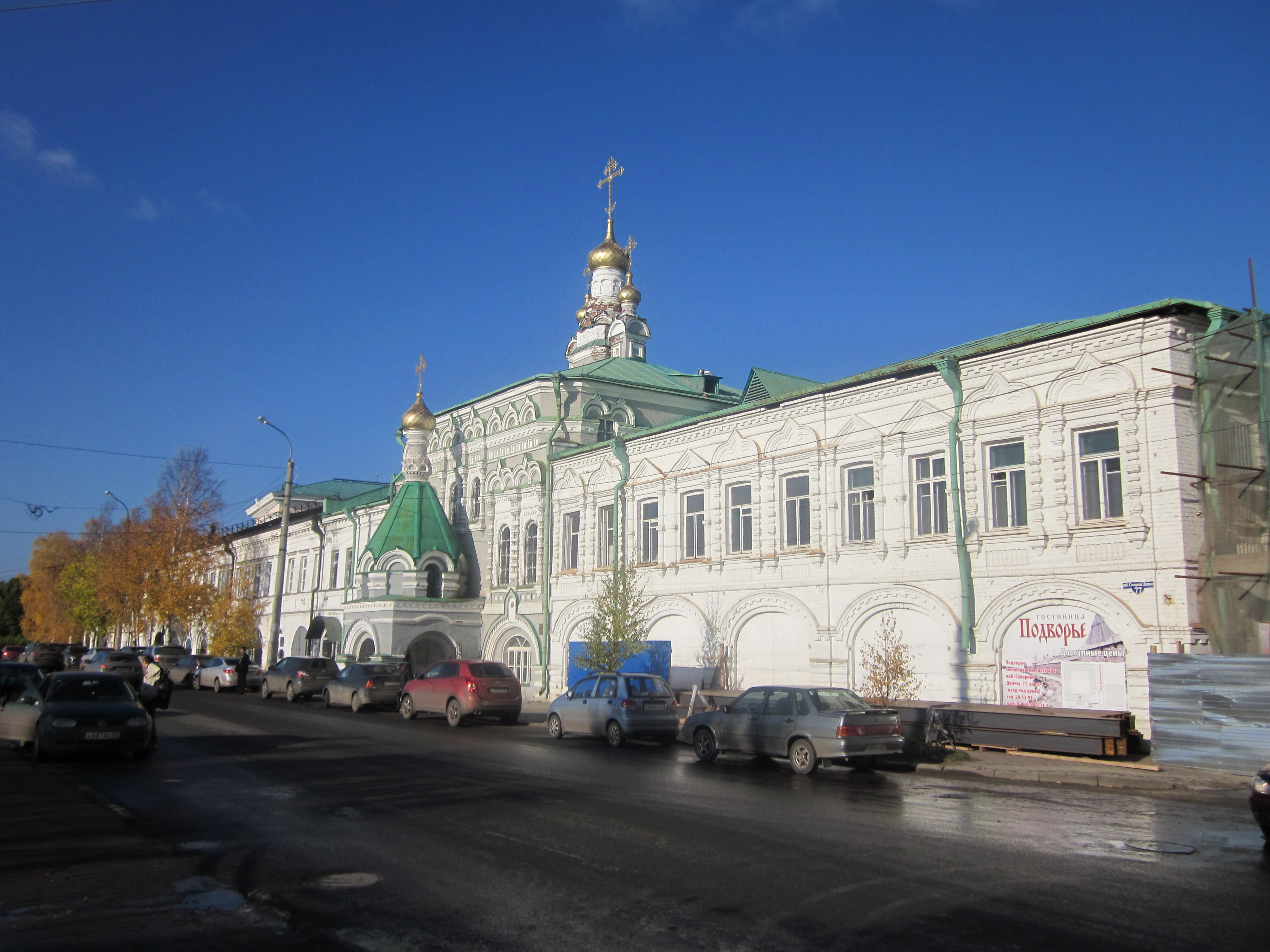 Главный корпус с церковью преподобных Зосимы, Савватия и Германа (Архангельская область, Архангельск, Северной Двины наб., 77, Банковский переулок, 1)